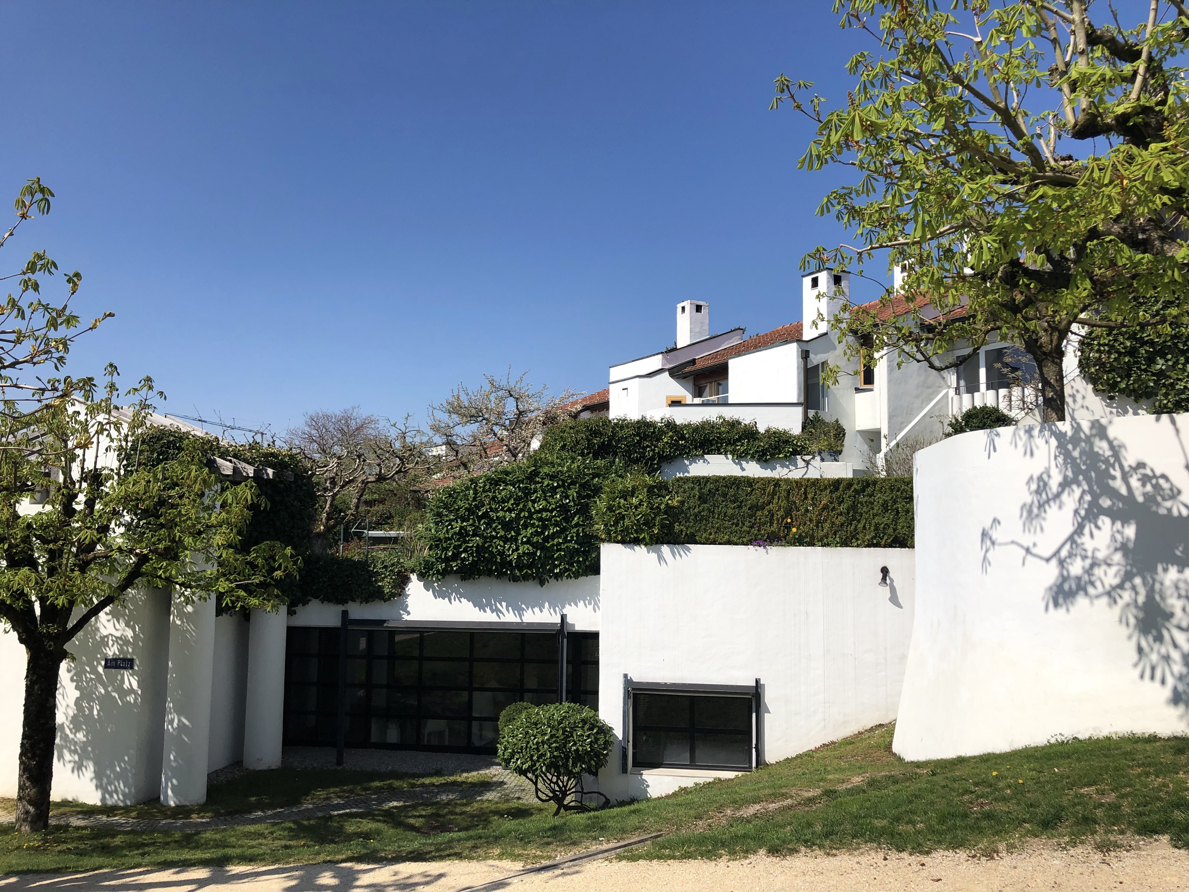 Im Dorf Seldwyla